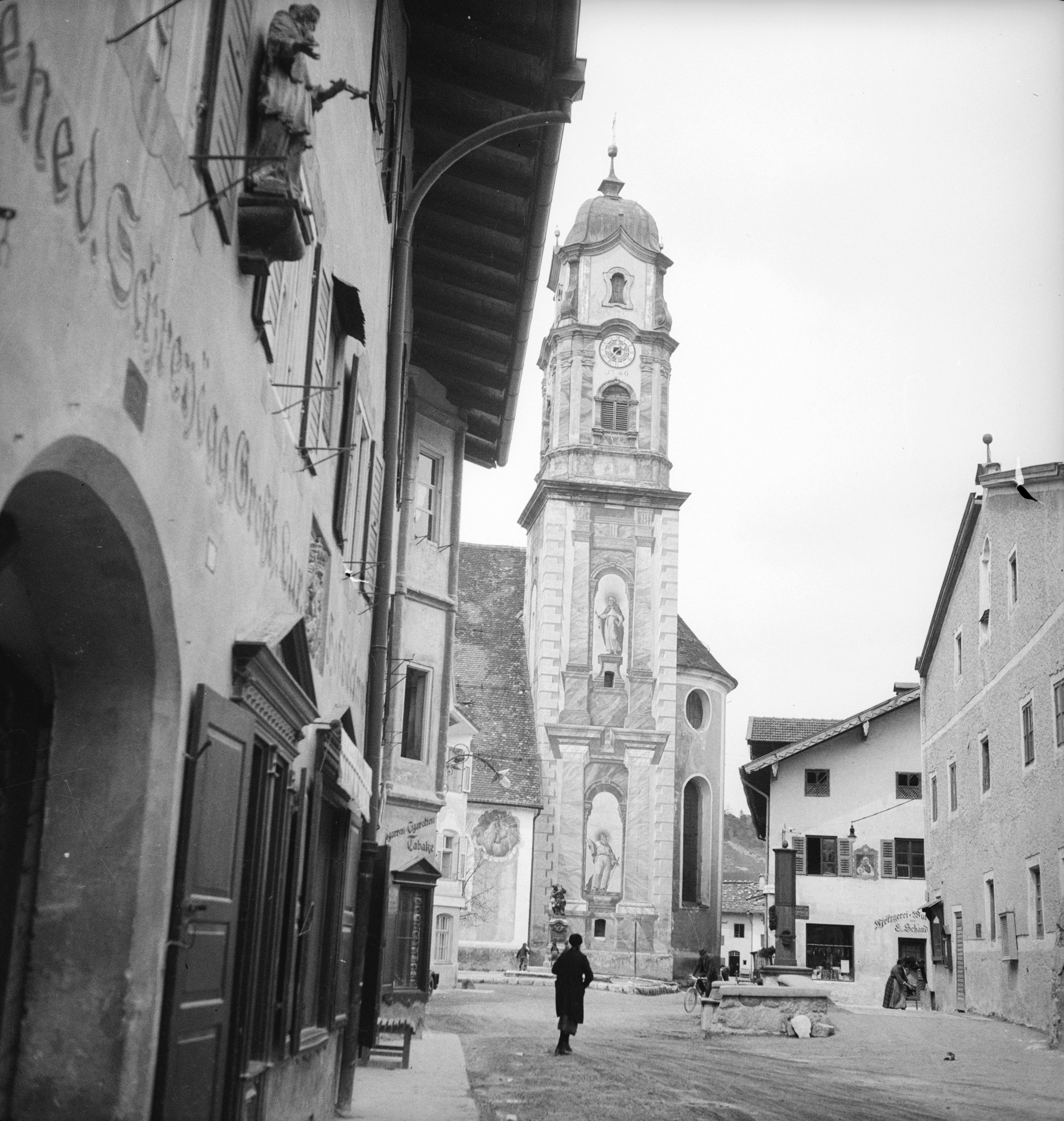 Deutschland, Mittenwald: Häuser; Die katholische Pfarrkirche St. Peter und Paul